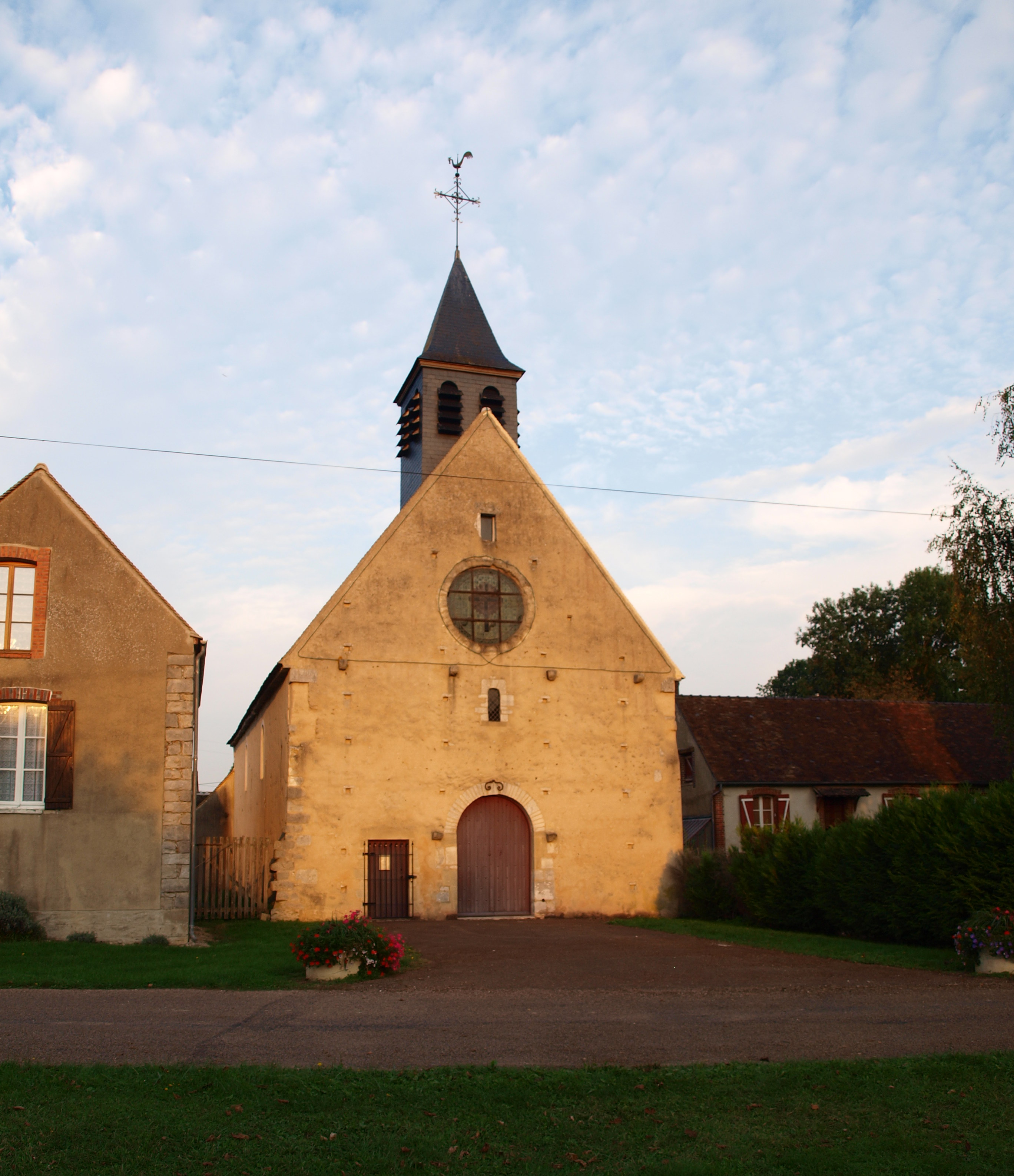 Rousson (Yonne , France)